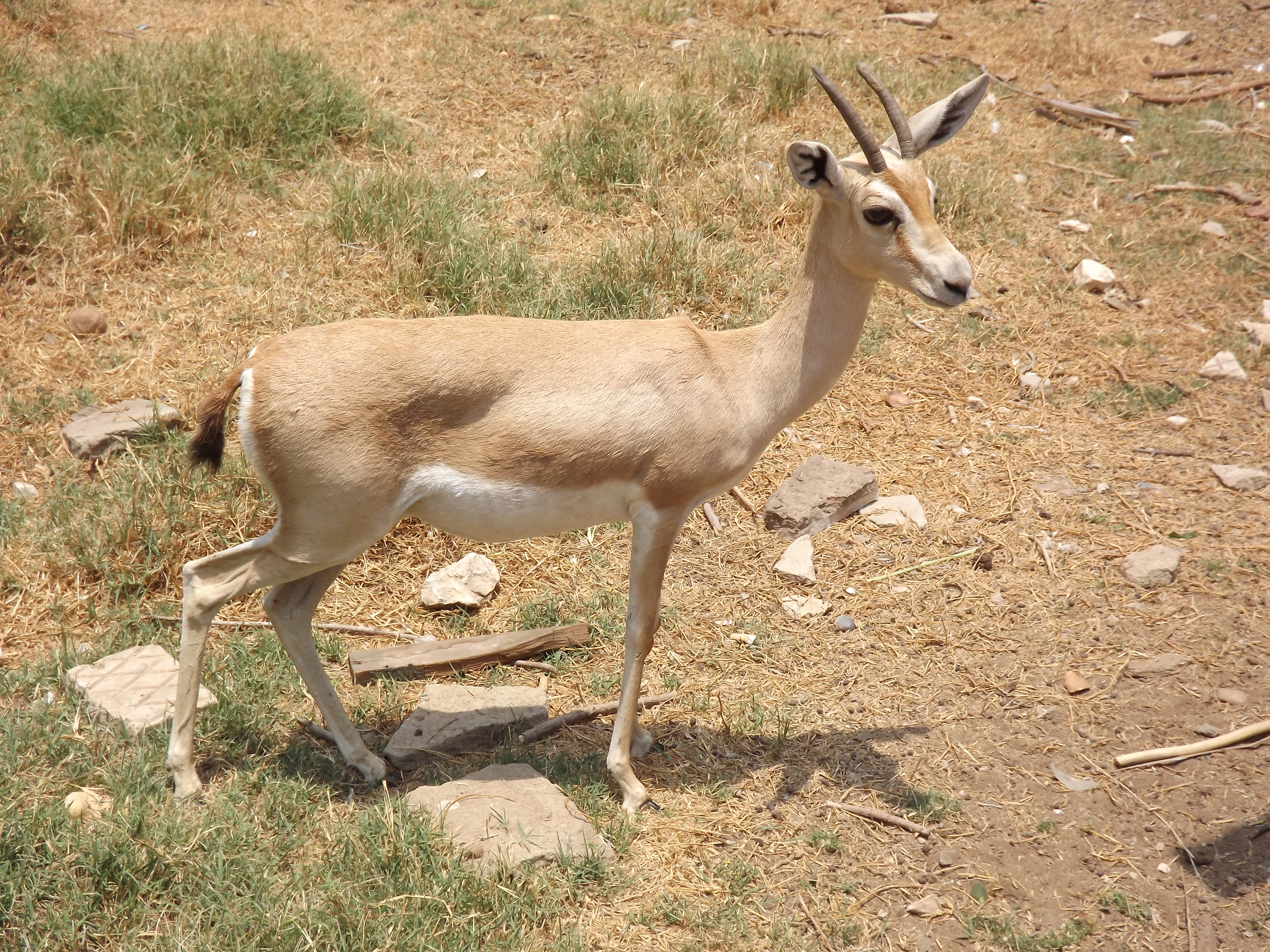 غزال مصري (غزال دوركاس) في حديقة حيوان الجيزة